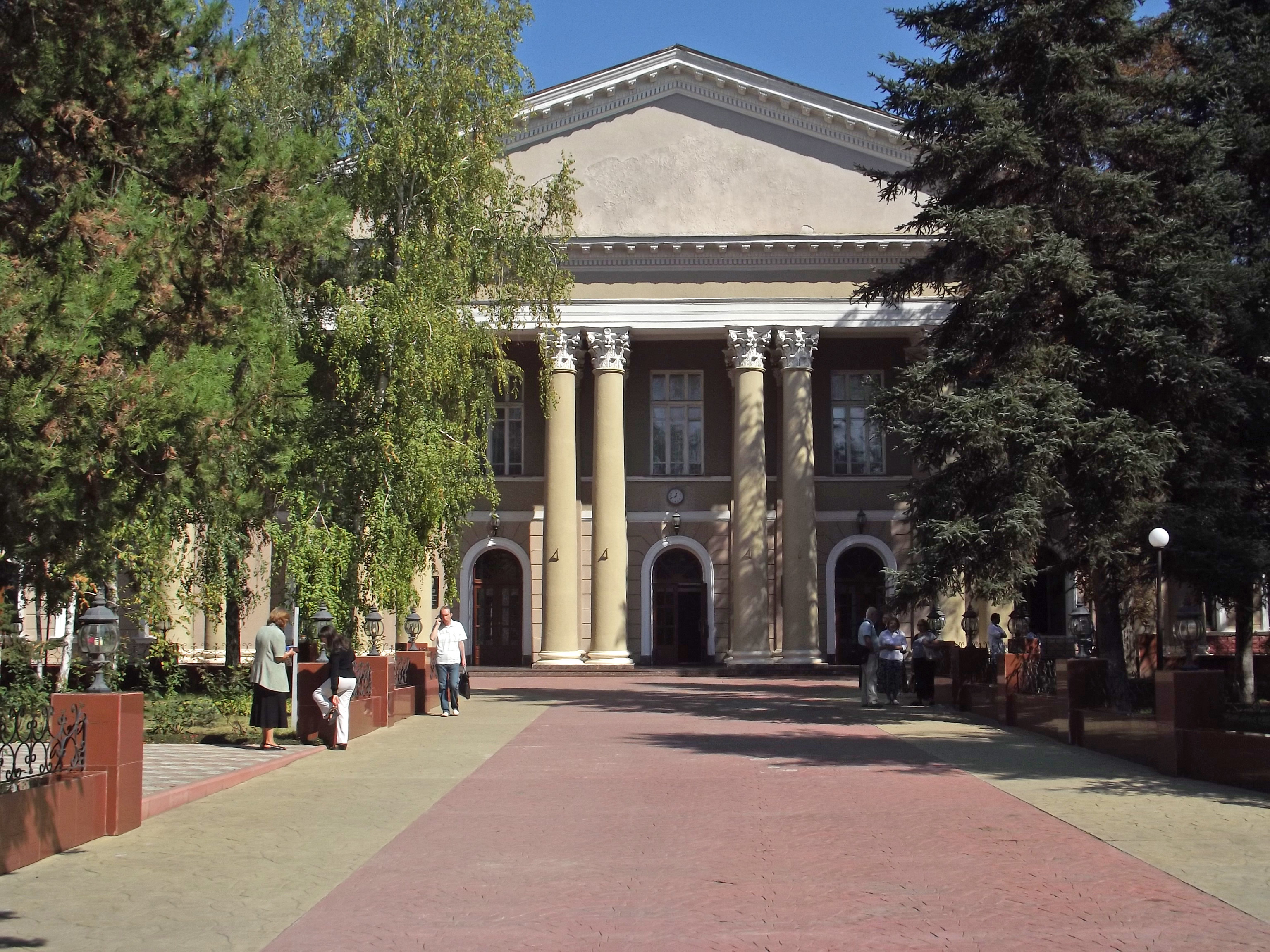 Крымский медицинский университет